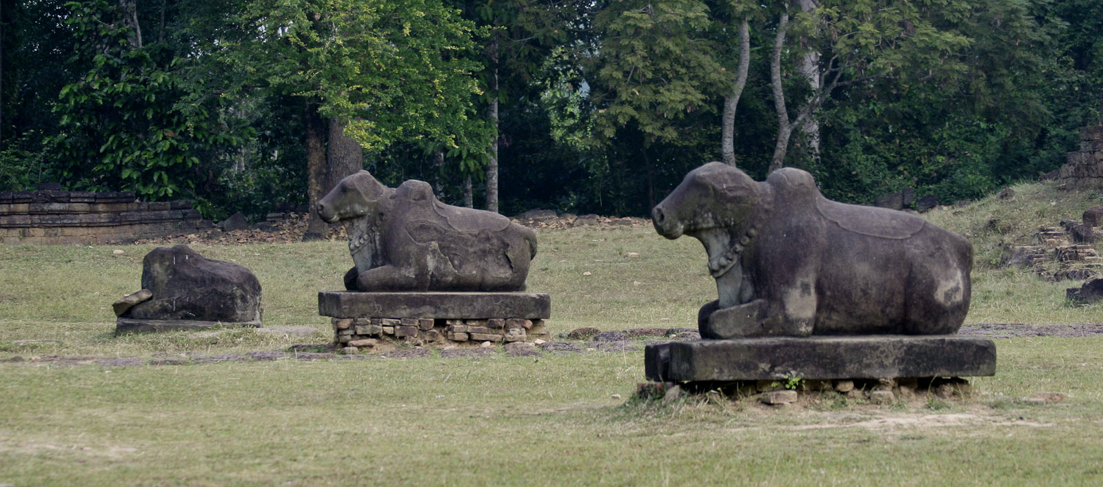 Shiva's Bulls